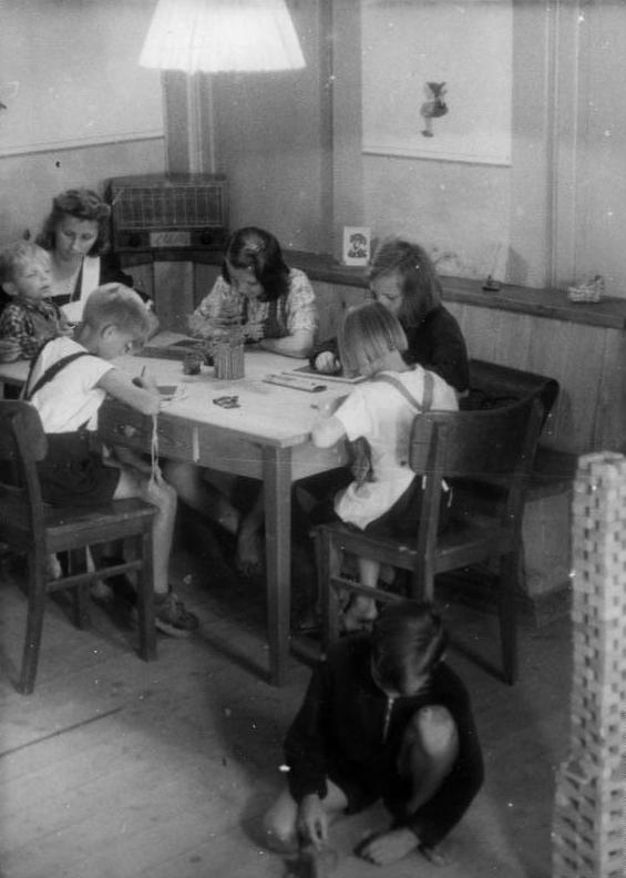 ADN-ZB/Illus-Dumm Kinderdorf Schloß Wilhelmsthal bei Eisenach, 1947, Bild zeigt: Einen recht wohnlich anmutenden Aufenthaltsraum wo zwei Geschwisterfamilien mit einer Hausmutter untergebracht ist.